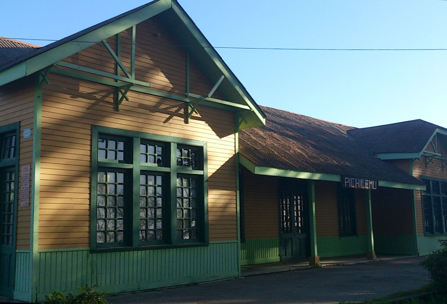 Estación de ferrocarriles de Pichilemu This is a photo of a national monument in Chile: 373